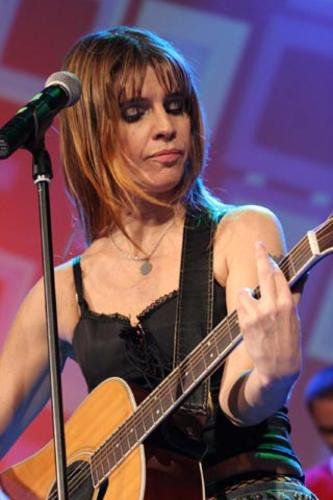 much music 2006